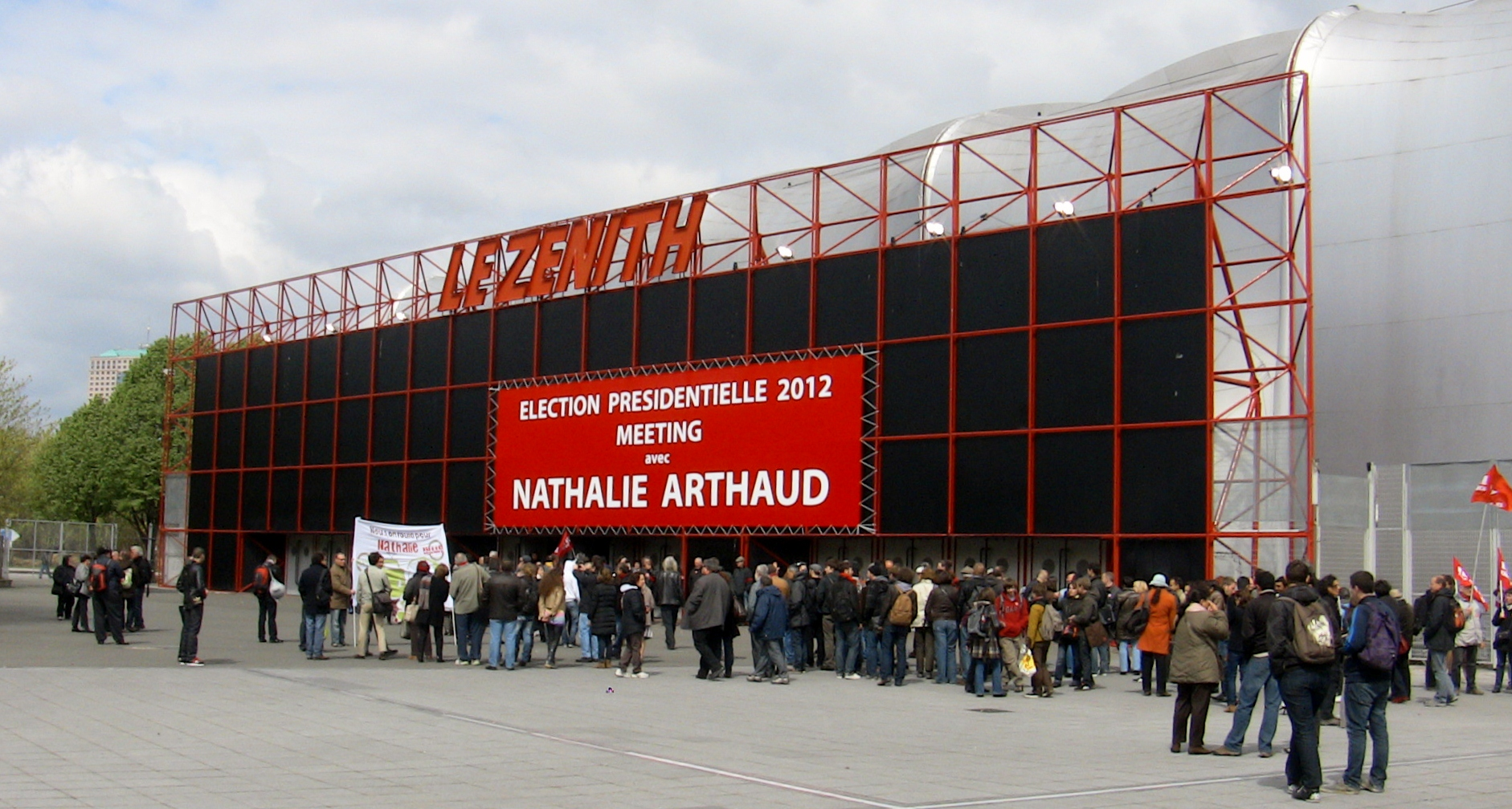 Le Zénith de Paris pour le meeting de Lutte Ouvrière le dimanche 15 avril 2012.